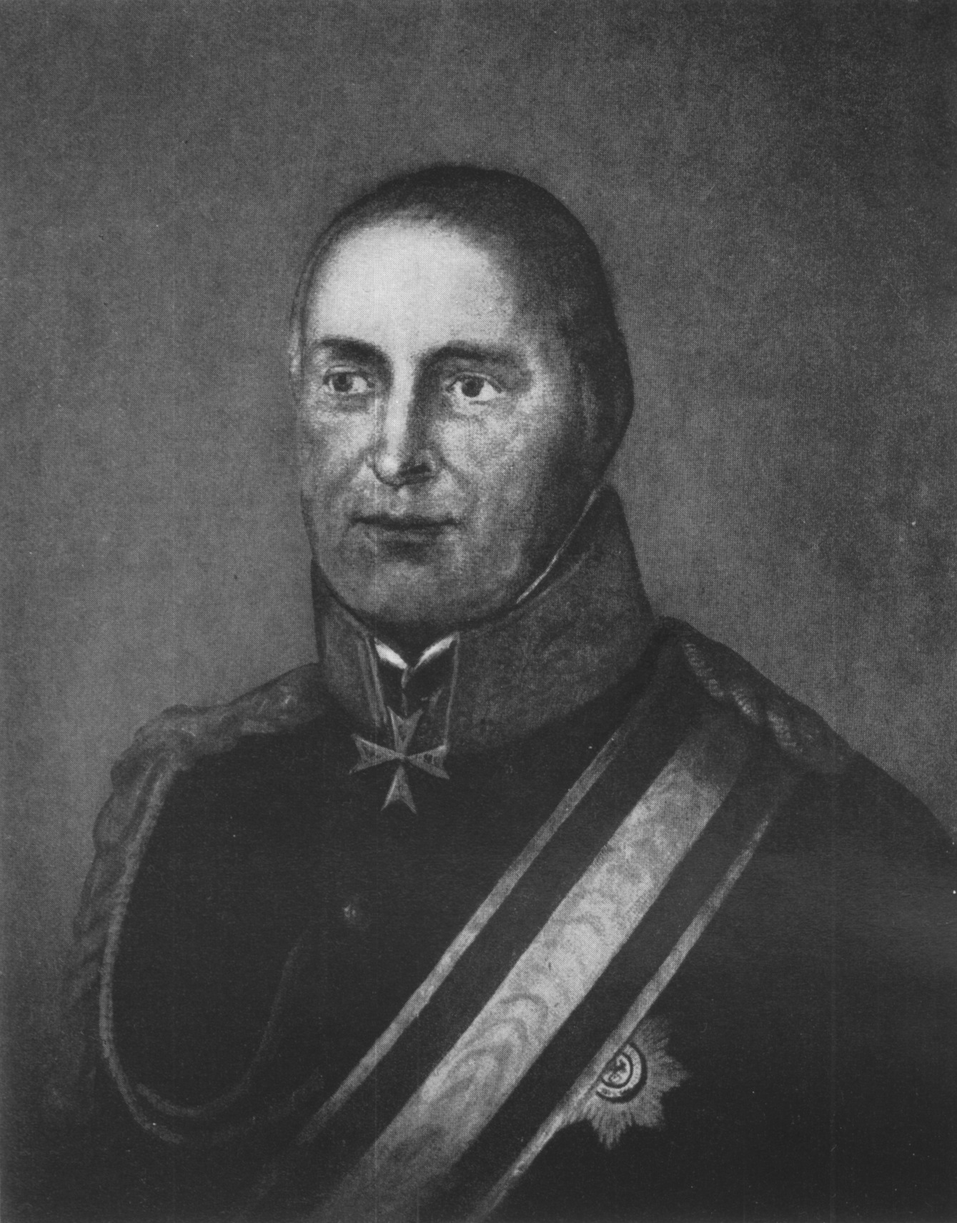 Ludwig August von Stutterheim (03.06.1750-13.10.1826) General der Infanterie, Gouverneur von Königsberg